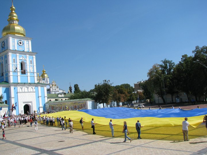 Прапор